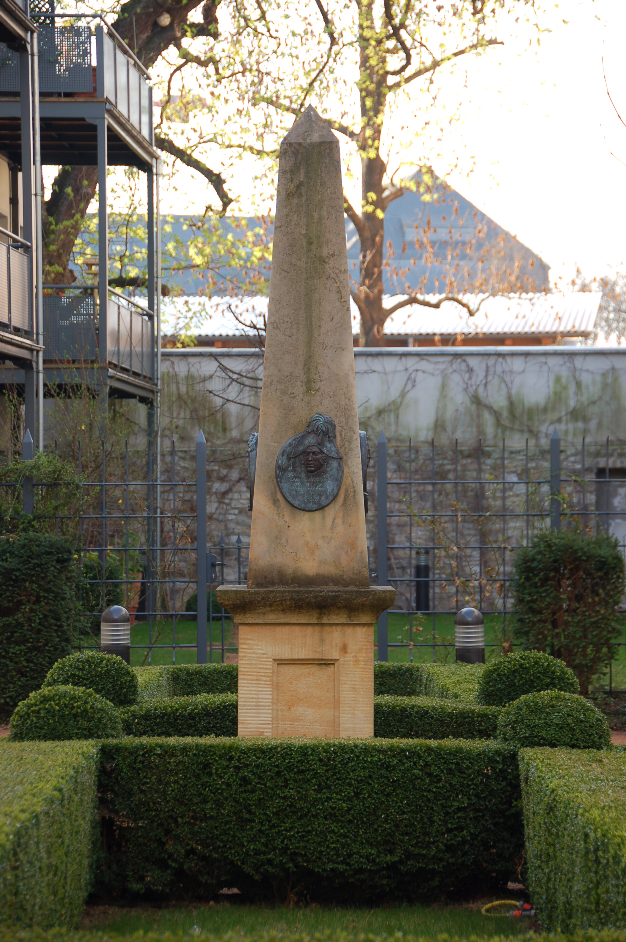 Denkmal im Innenhof von Anger 6